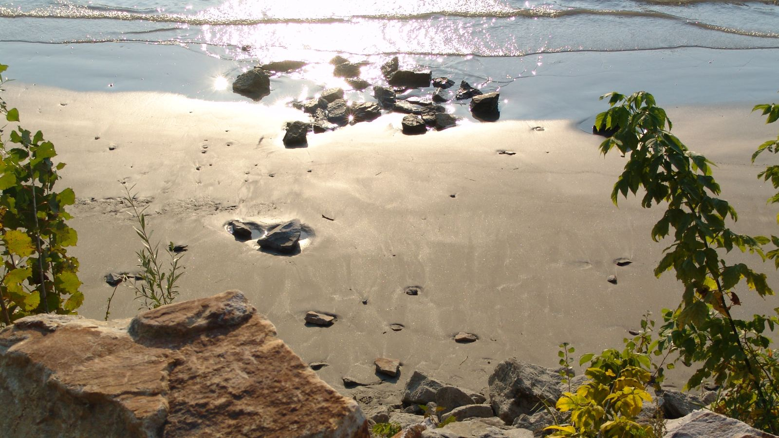 fotografiert in Dürnstein in der Wachau im September 2005 Foto von Walter Hochauer [1]